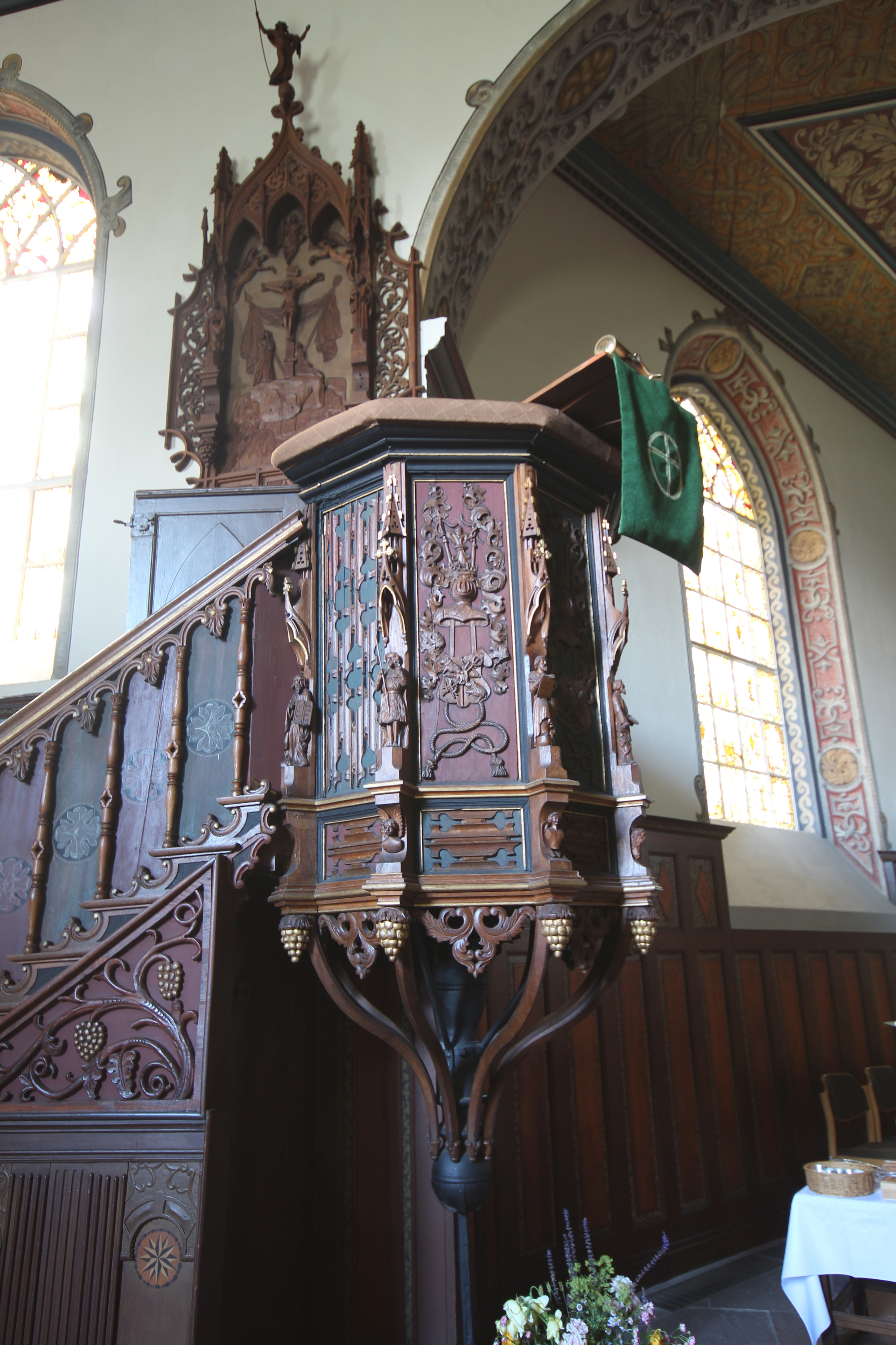 Kanzel der Lutherkirche zu Leer (Ostfriesland)